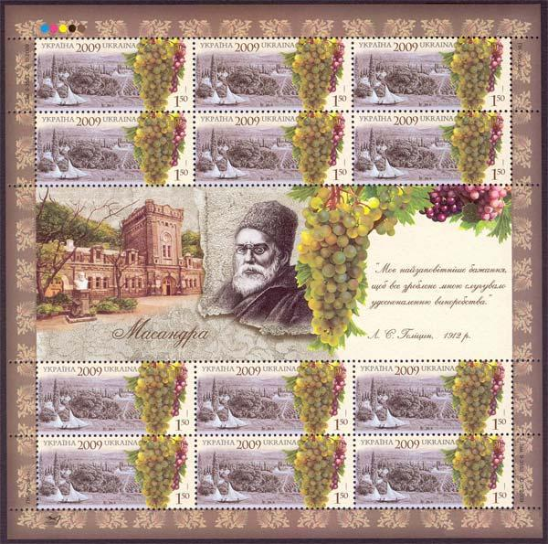 Серія «Виноробство в Україні». Марка України «Мускат білий»